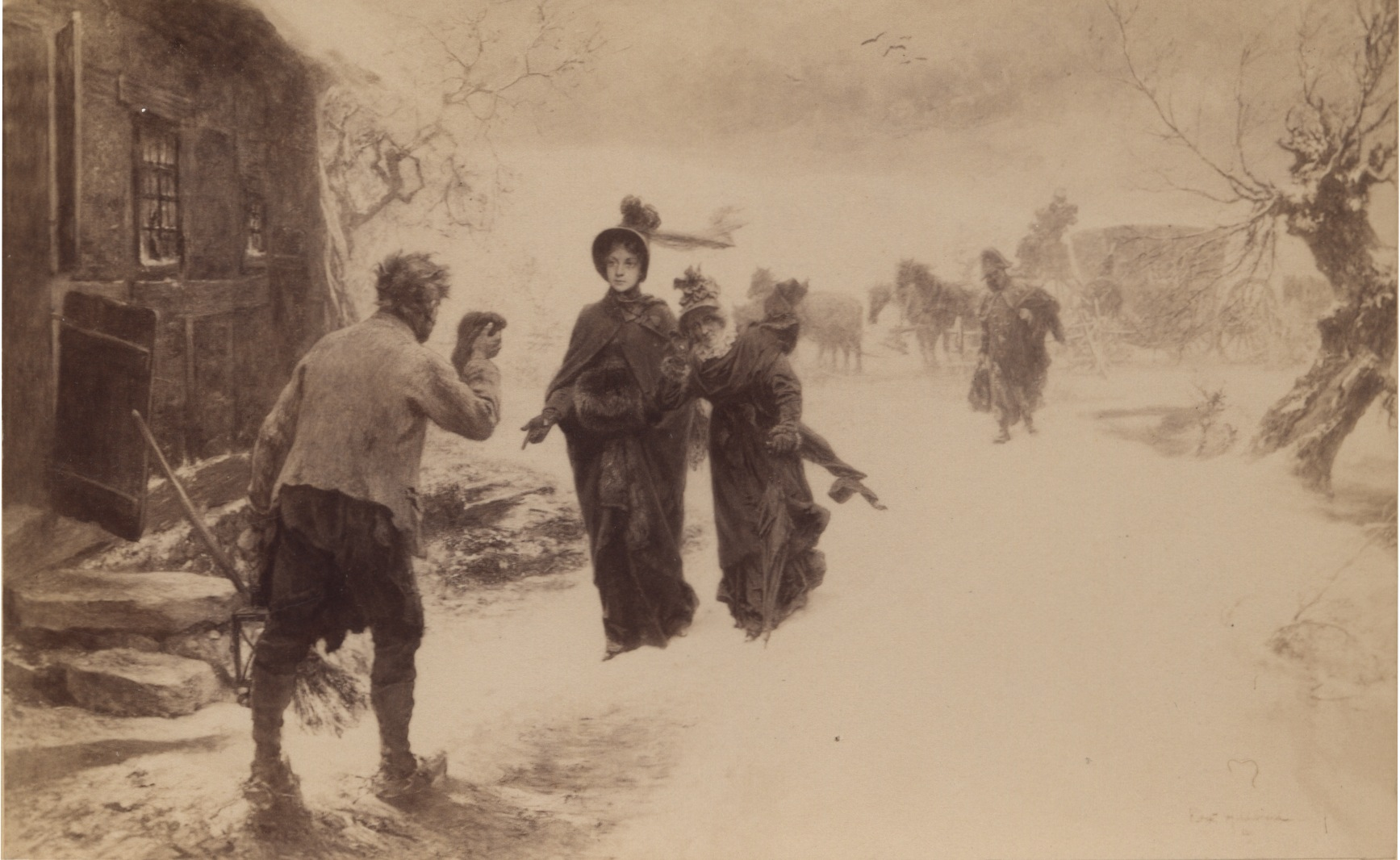 Königin Luise am Arm der Gräfin Voss auf der Flucht nach Memel 1807